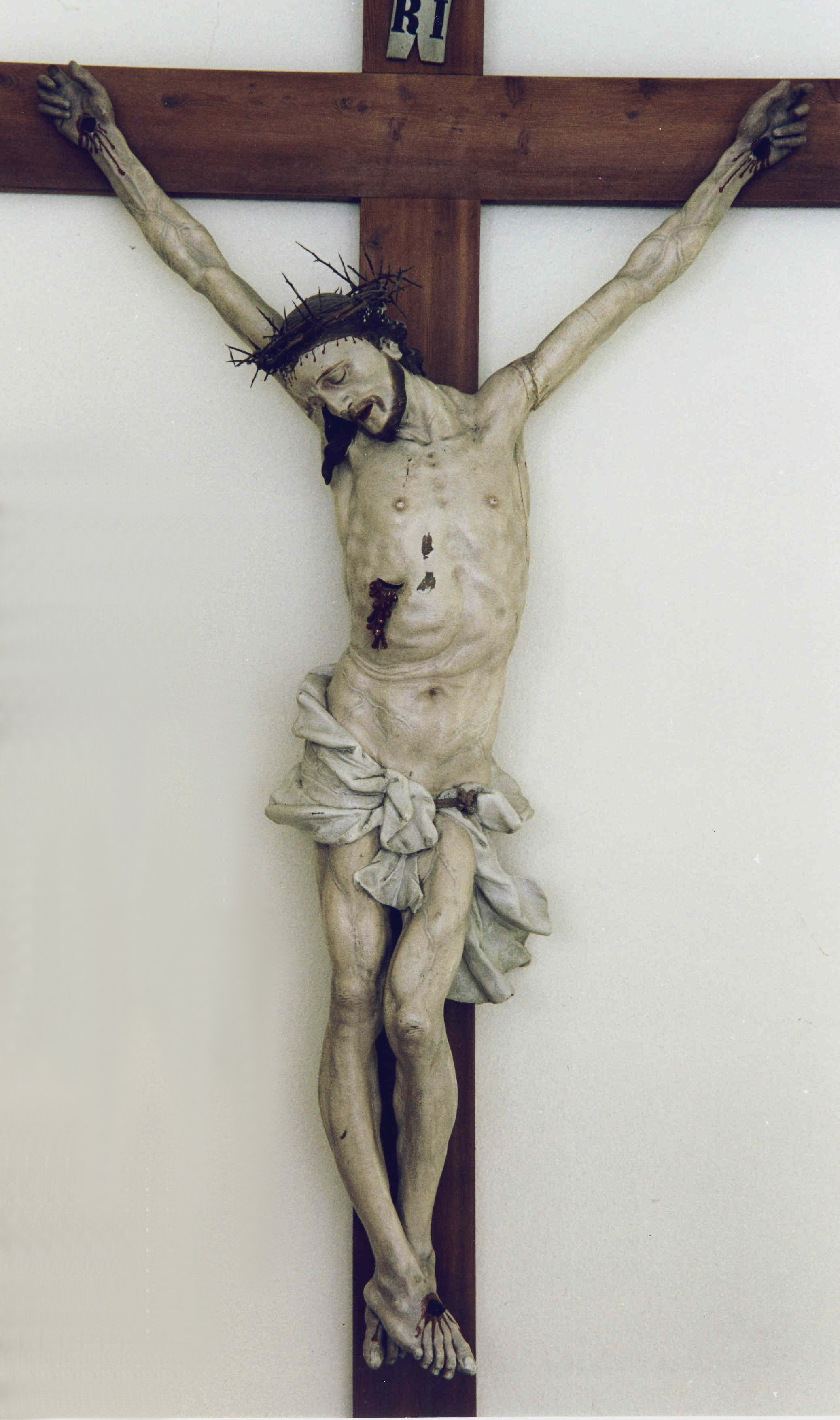 Kruzifix von Johann Sigmund Hitzelberger im Kloster Reutte (Tirol)